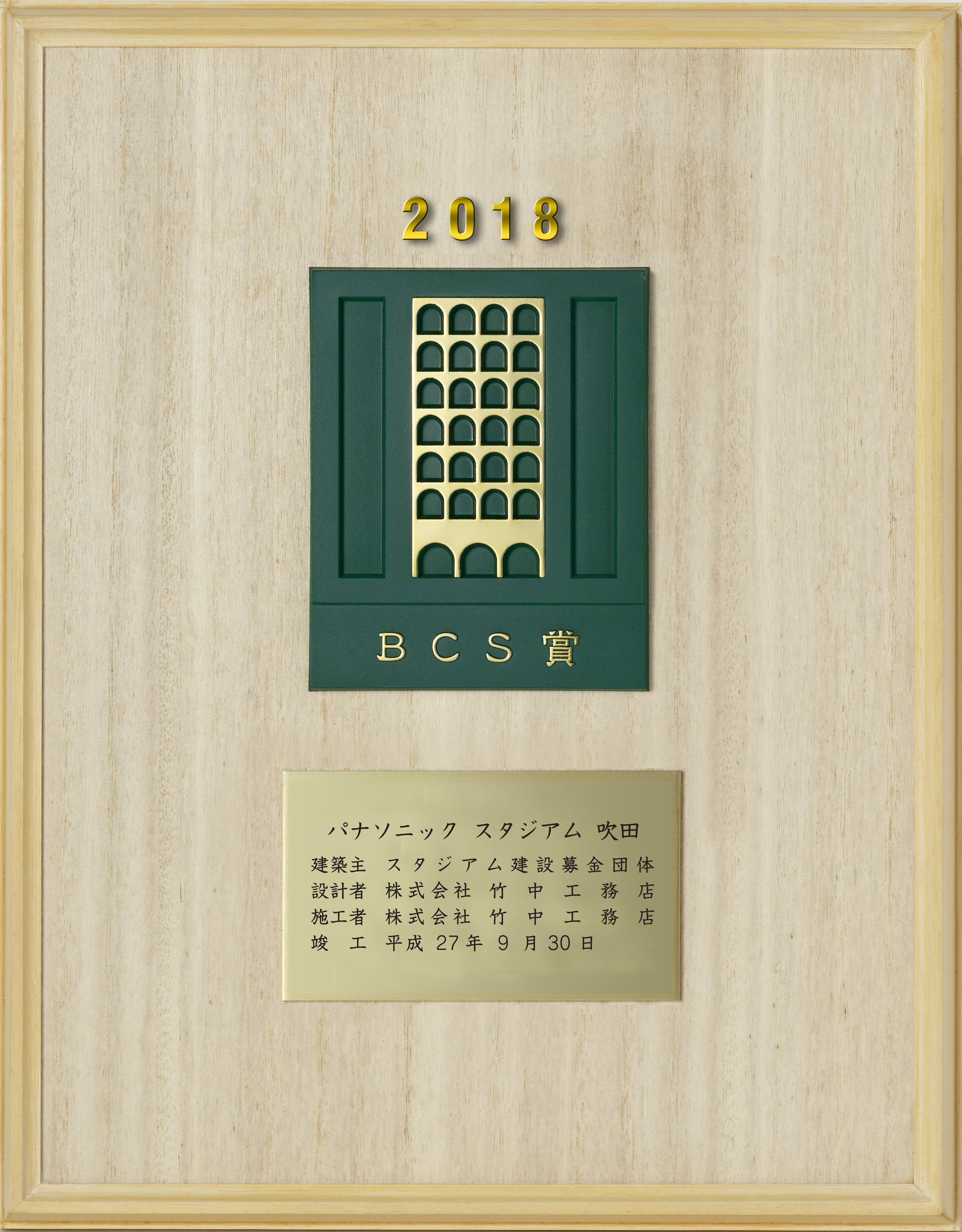 設計者及び施工者（共同企業体の場合は代表者（2006年より））に贈呈する。